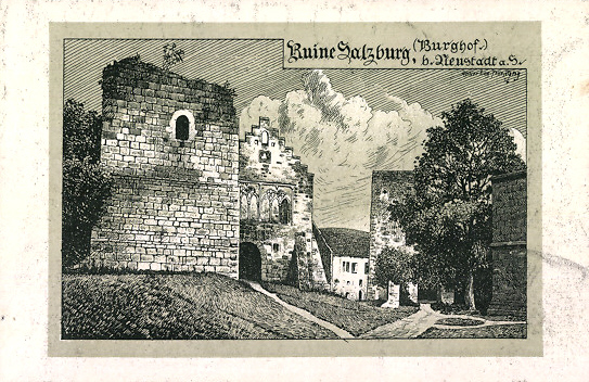 Ansichtskarte von Eugen FelleMotiv: Ruine Salzburg bei Bad Neustadt